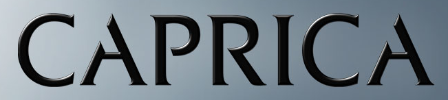 Logo de la série télévisé Caprica.